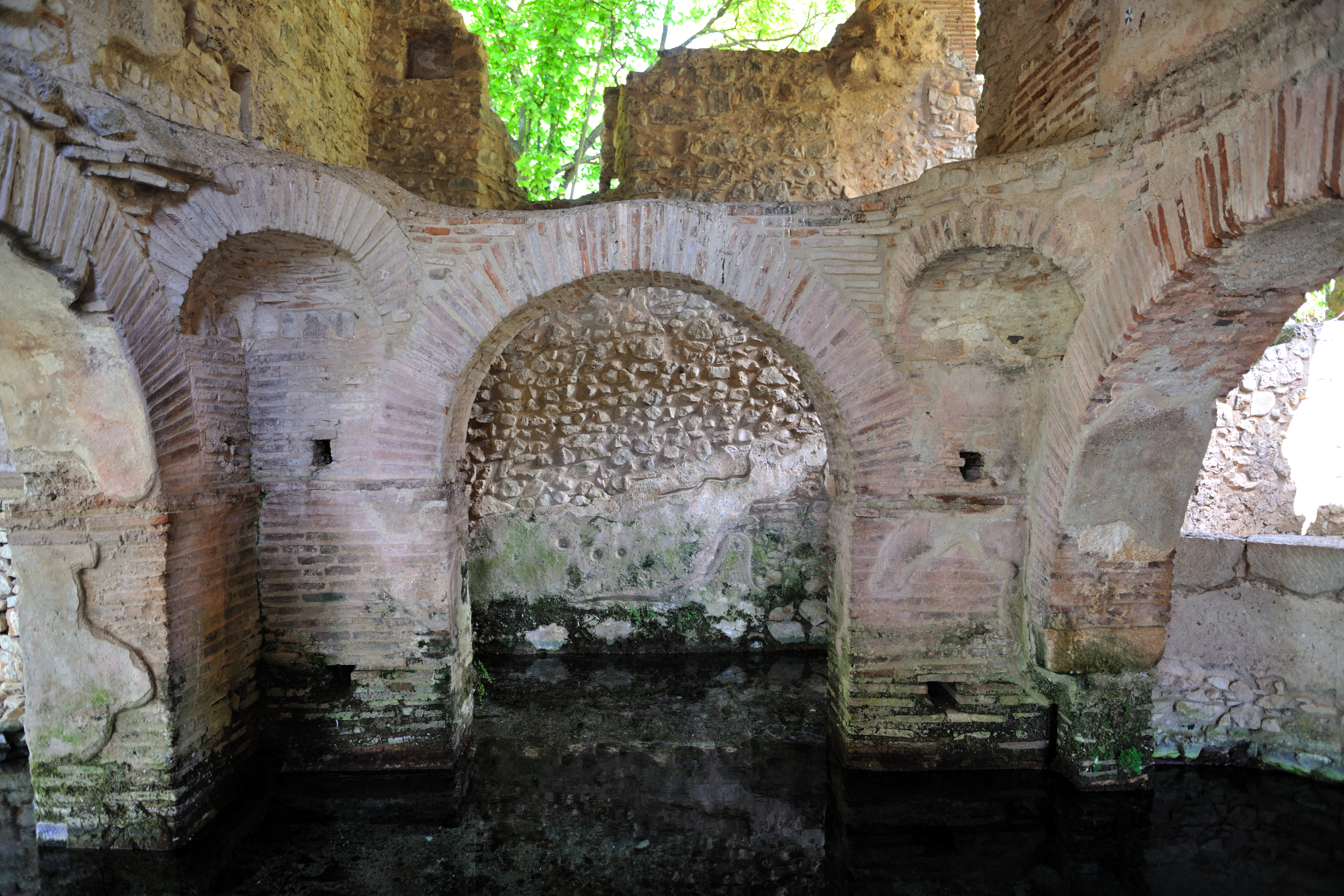 Battistero palocristiano di San Giovanni in Fonte This is a photo of a monument which is part of cultural heritage of Italy.